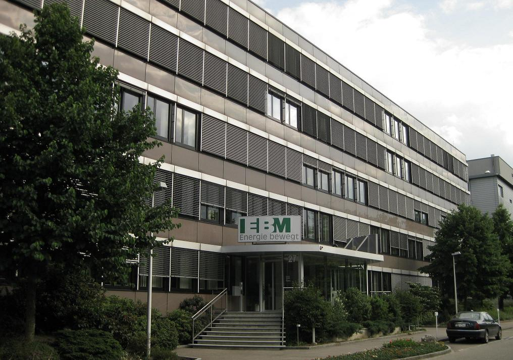 Haupteingang Elektra Birseck Münchenstein